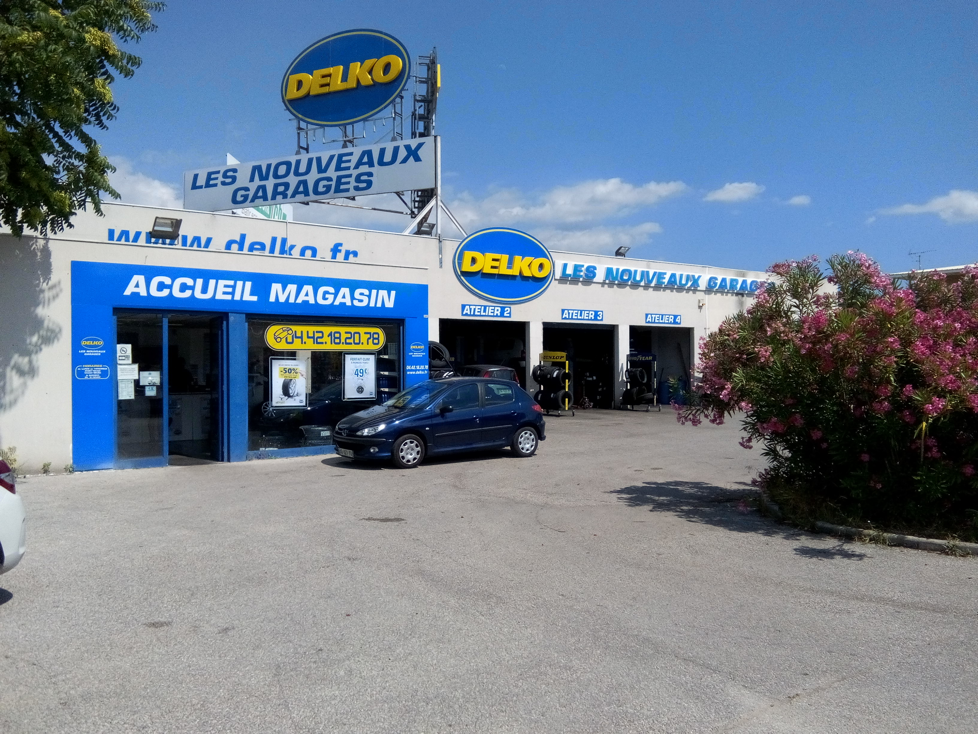 Le Garage Delko de La Bouilladisse dans les Bouches-du-Rhônes